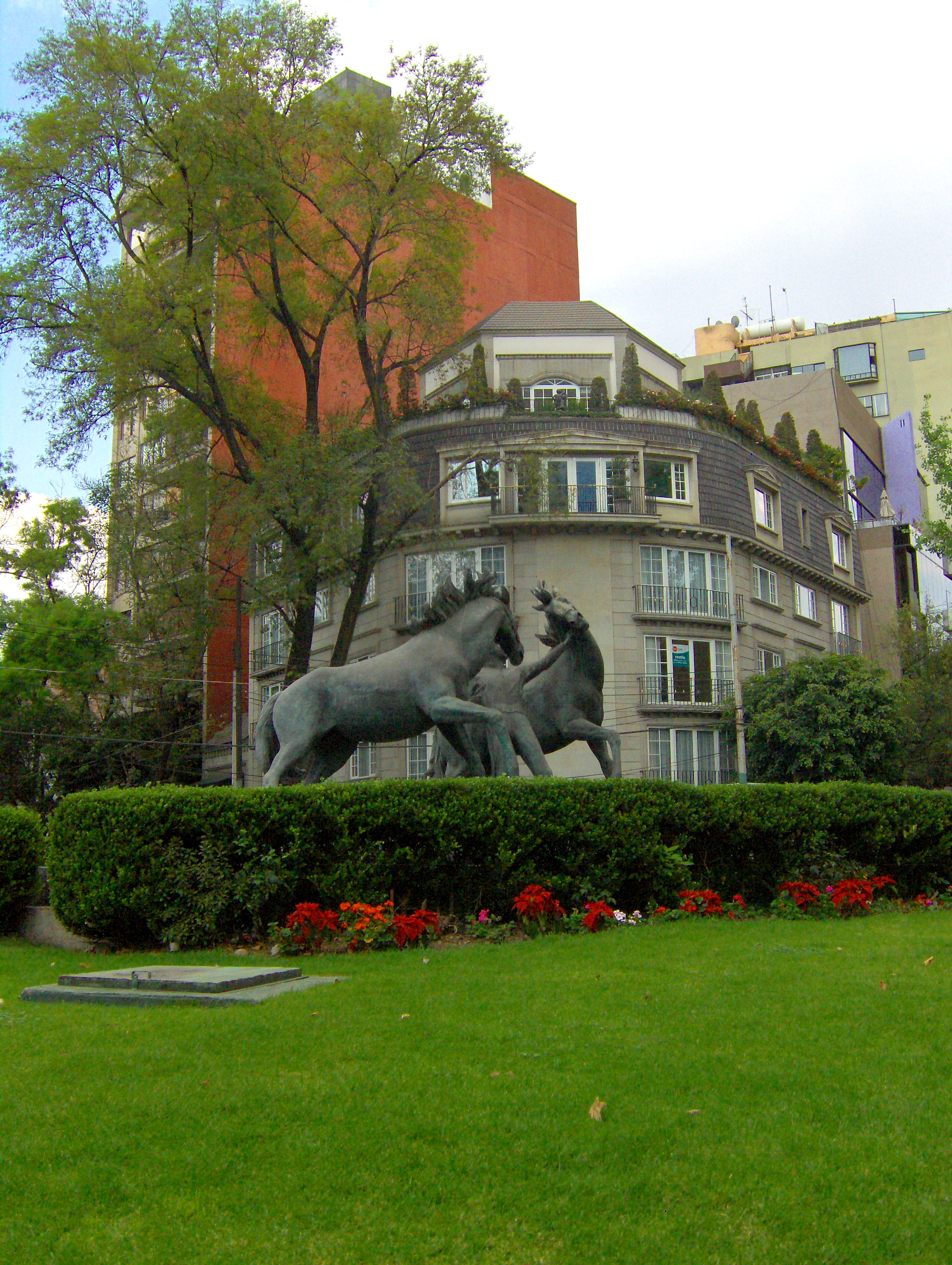 14 January 2008 Campos Eliseos Polanco